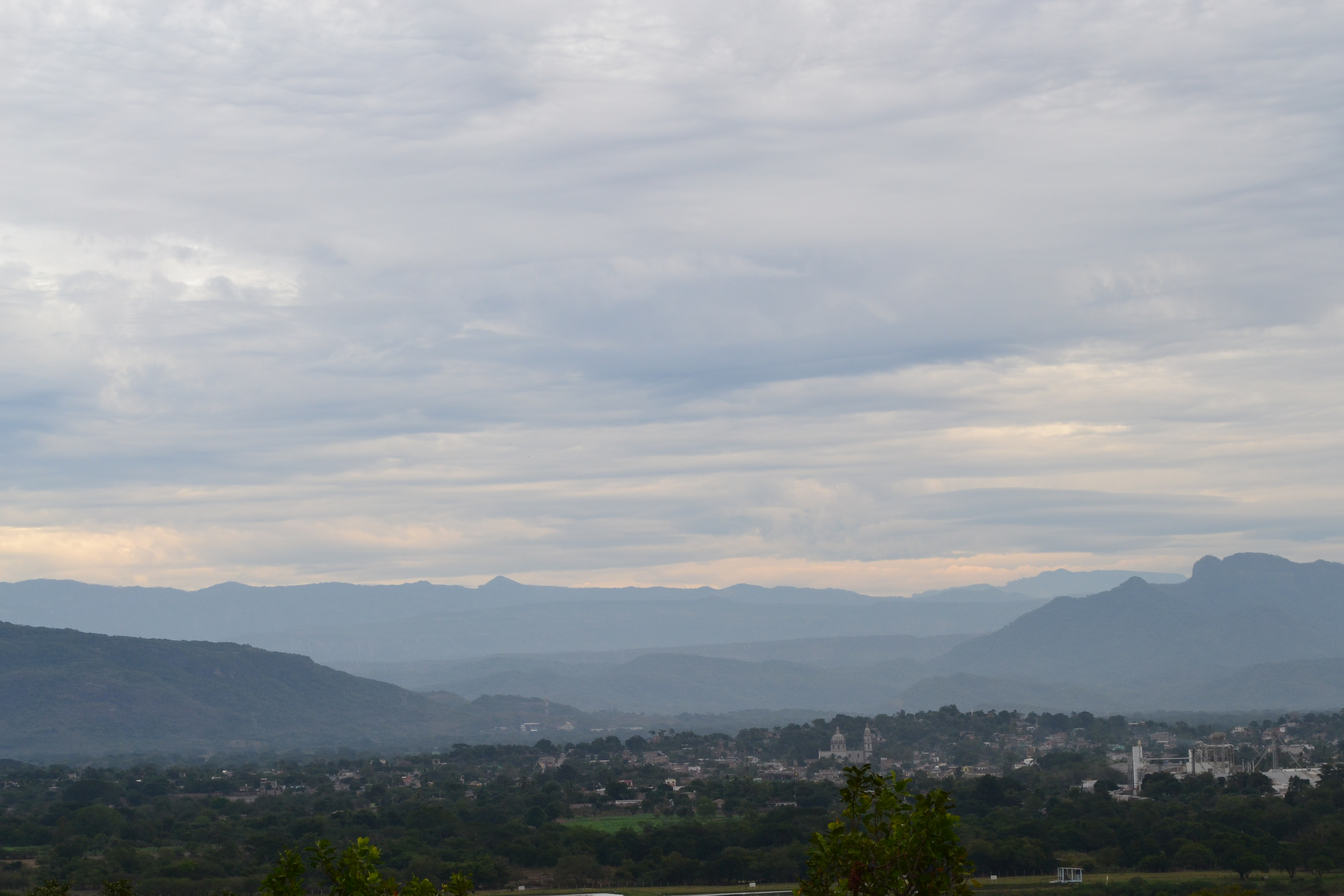 Vista panoramica de la ciudad de Acaponeta